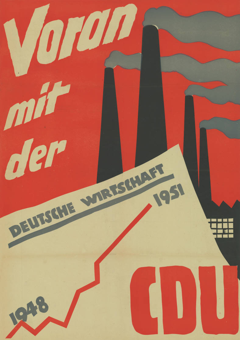 Voran mit der Deutsche Wirtschaft 1948 1951 CDU Abbildung: Rauchende Fabrikschornsteine (Grafik) Plakatart: Motiv-/Textplakat Objekt-Signatur: 10-010 : 55 Bestand: Landtagswahlplakate Rheinland-Pfalz (10-010) GliederungBestand10-18: Landtagswahlplakate Rheinland-Pfalz (10-010) » CDU Lizenz: KAS/ACDP 10-010 : 55 CC-BY-SA 3.0 DE